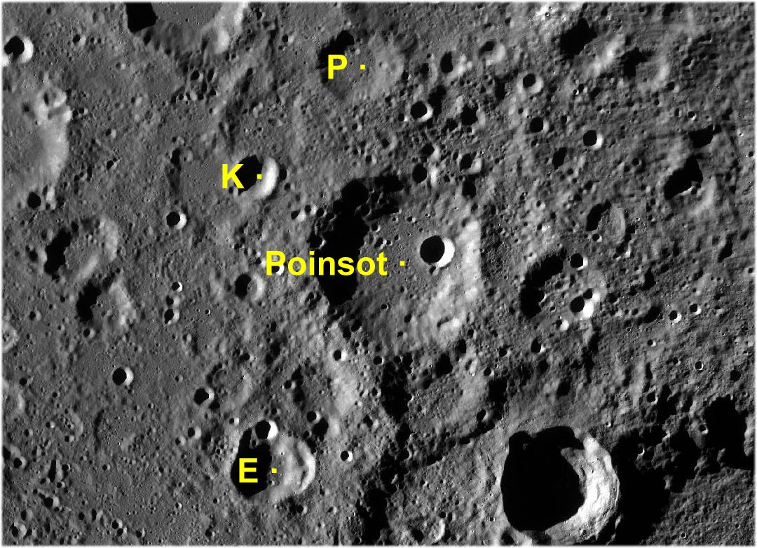 Cráter lunar Poinsot. Cráteres satélite. (Imagen LRO)